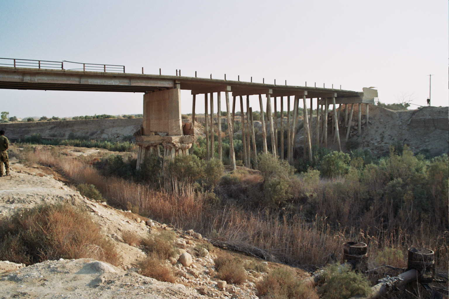 גשר עבדאללה, 2007